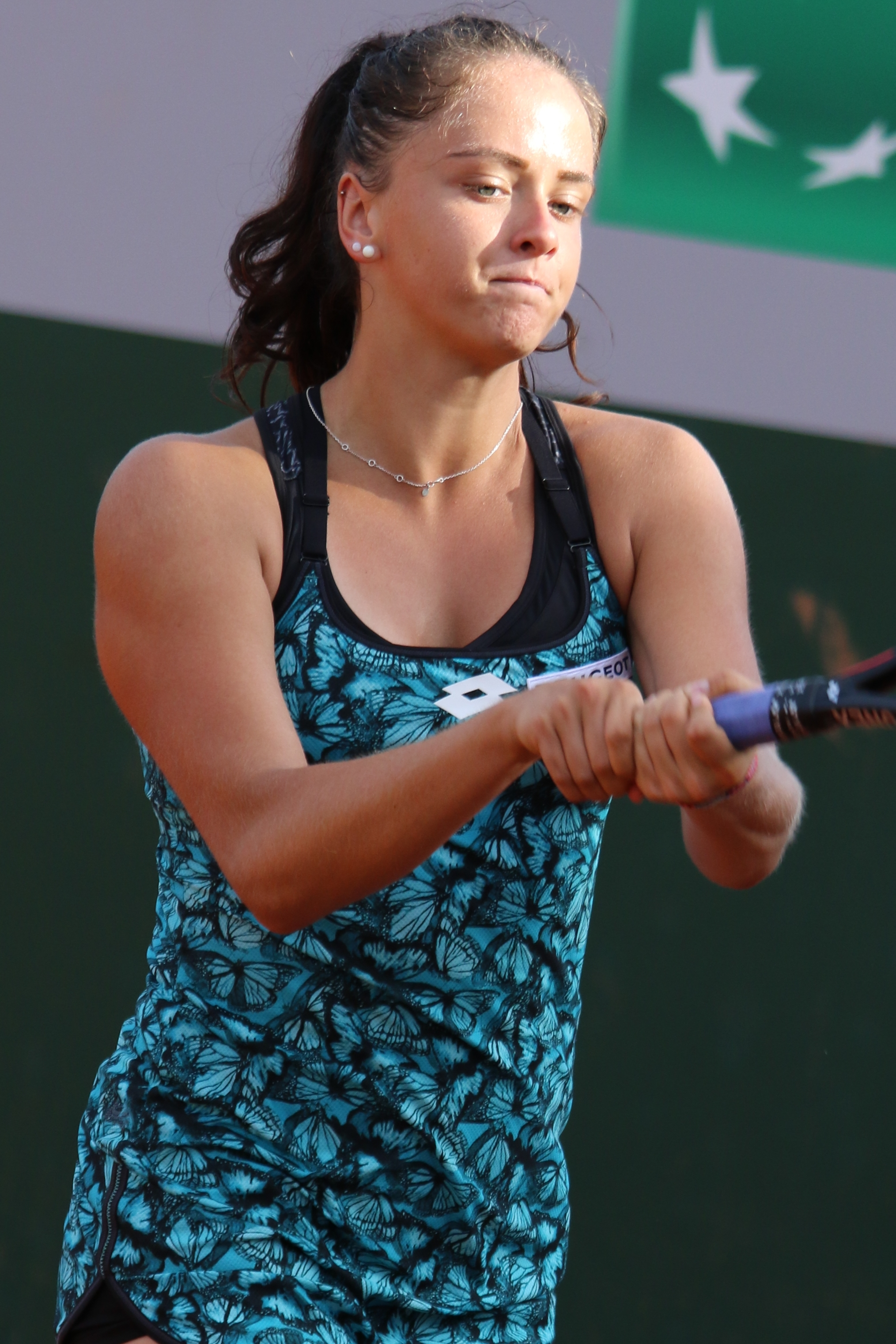 Kuzmova RG18 (12)